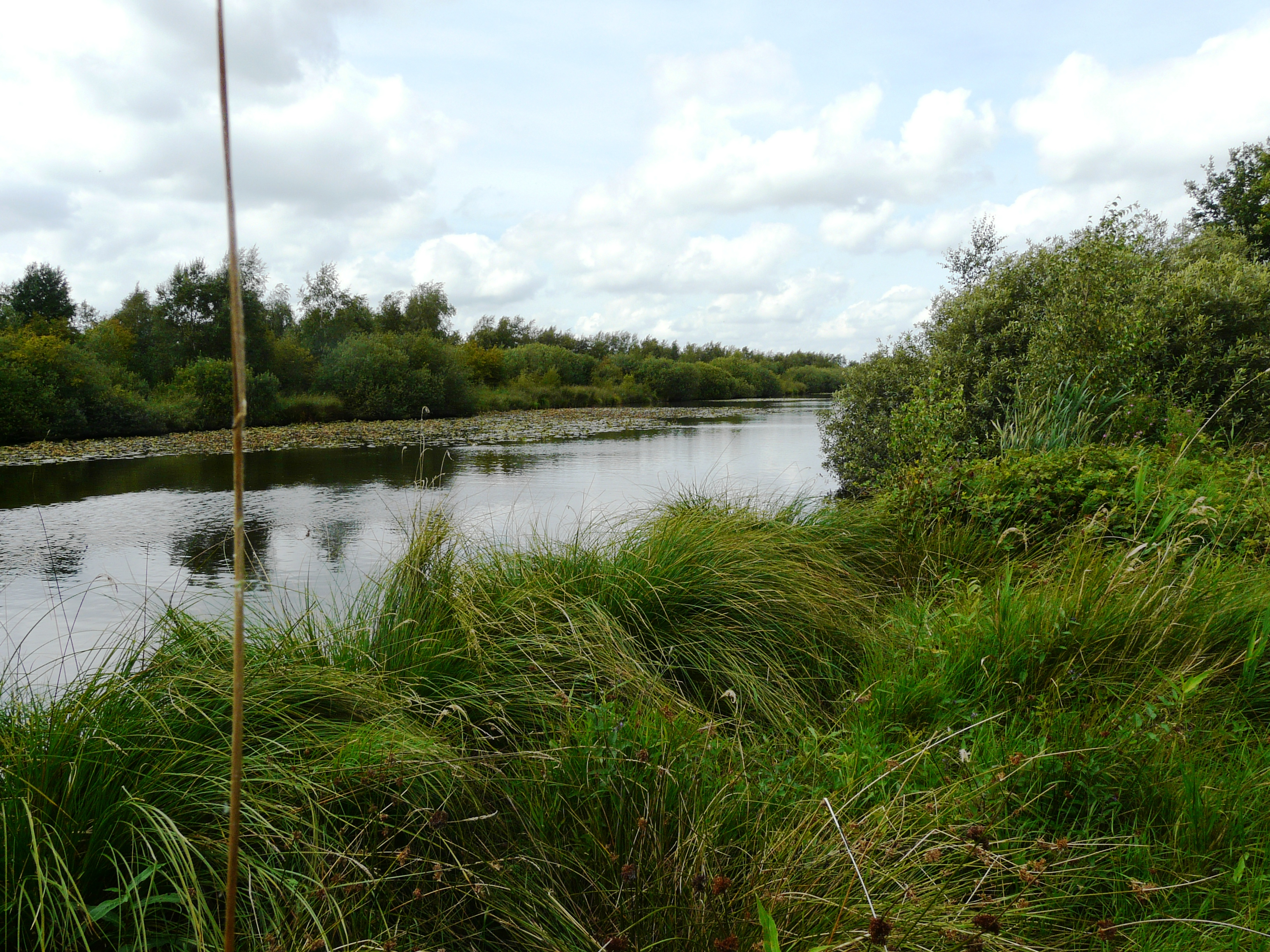 Petgat yn De Deelen